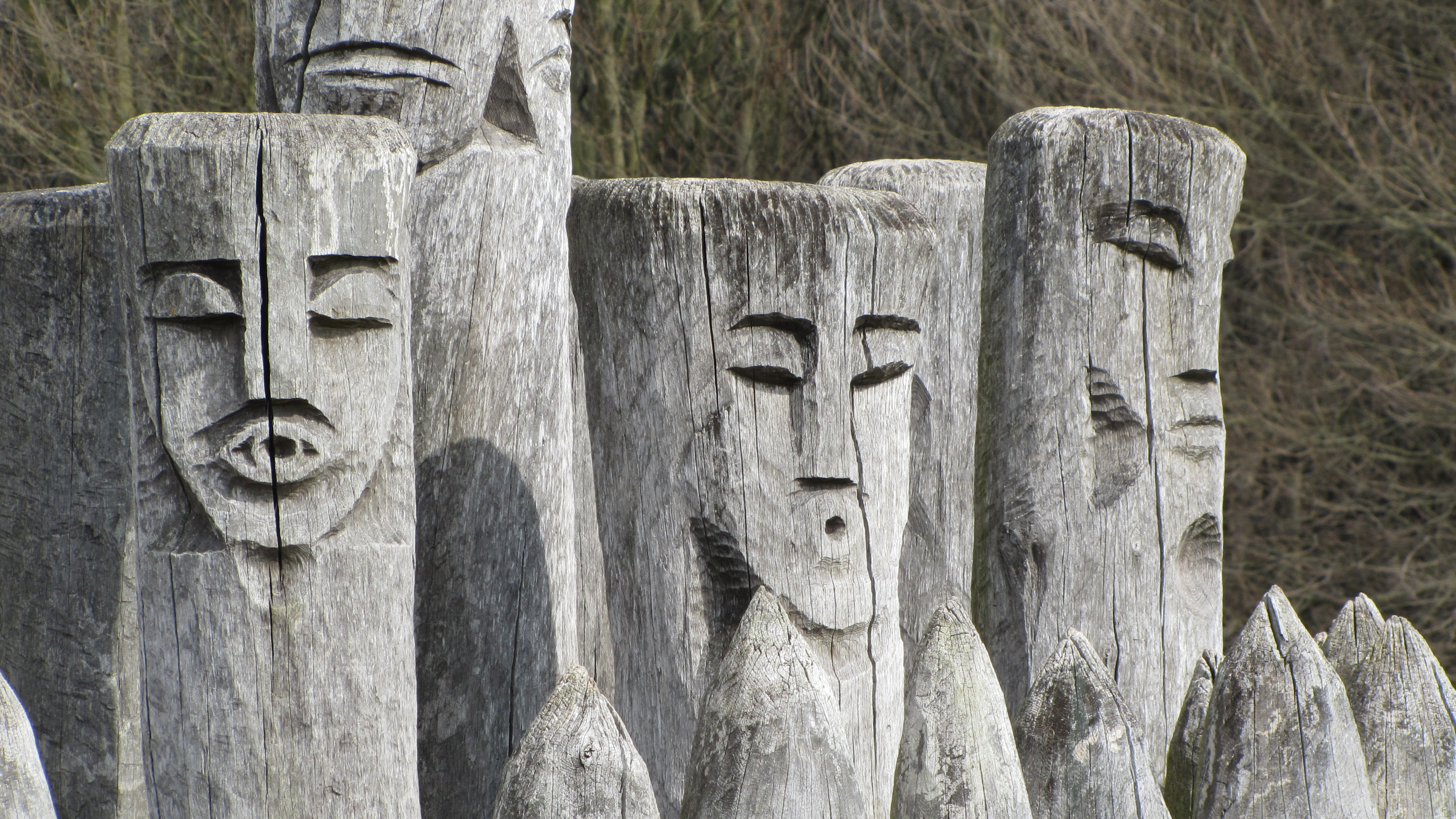 Bývalé hradiště Pohansko u Břeclavi